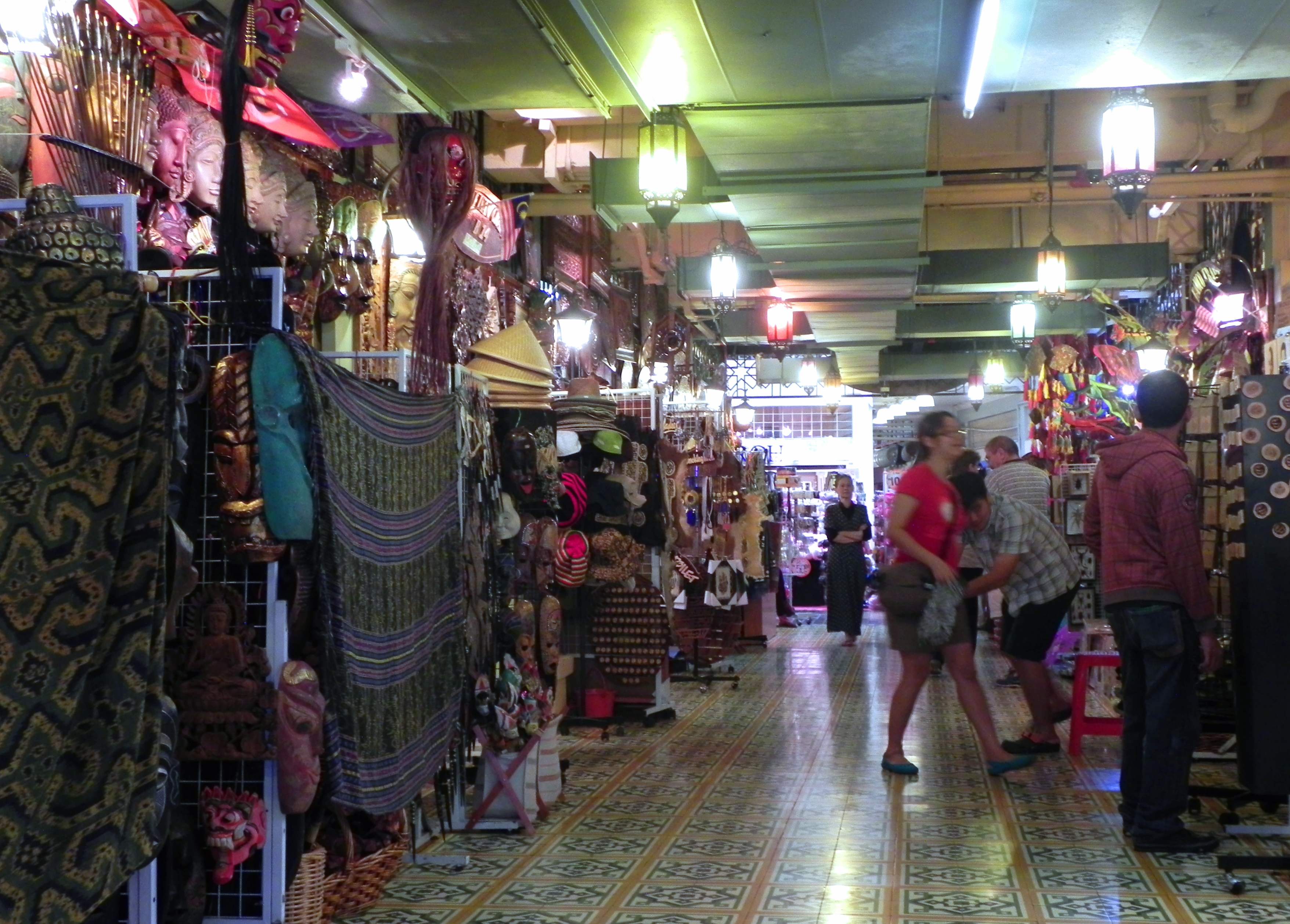 Durchgang im Central Market, Kuala Lumpur